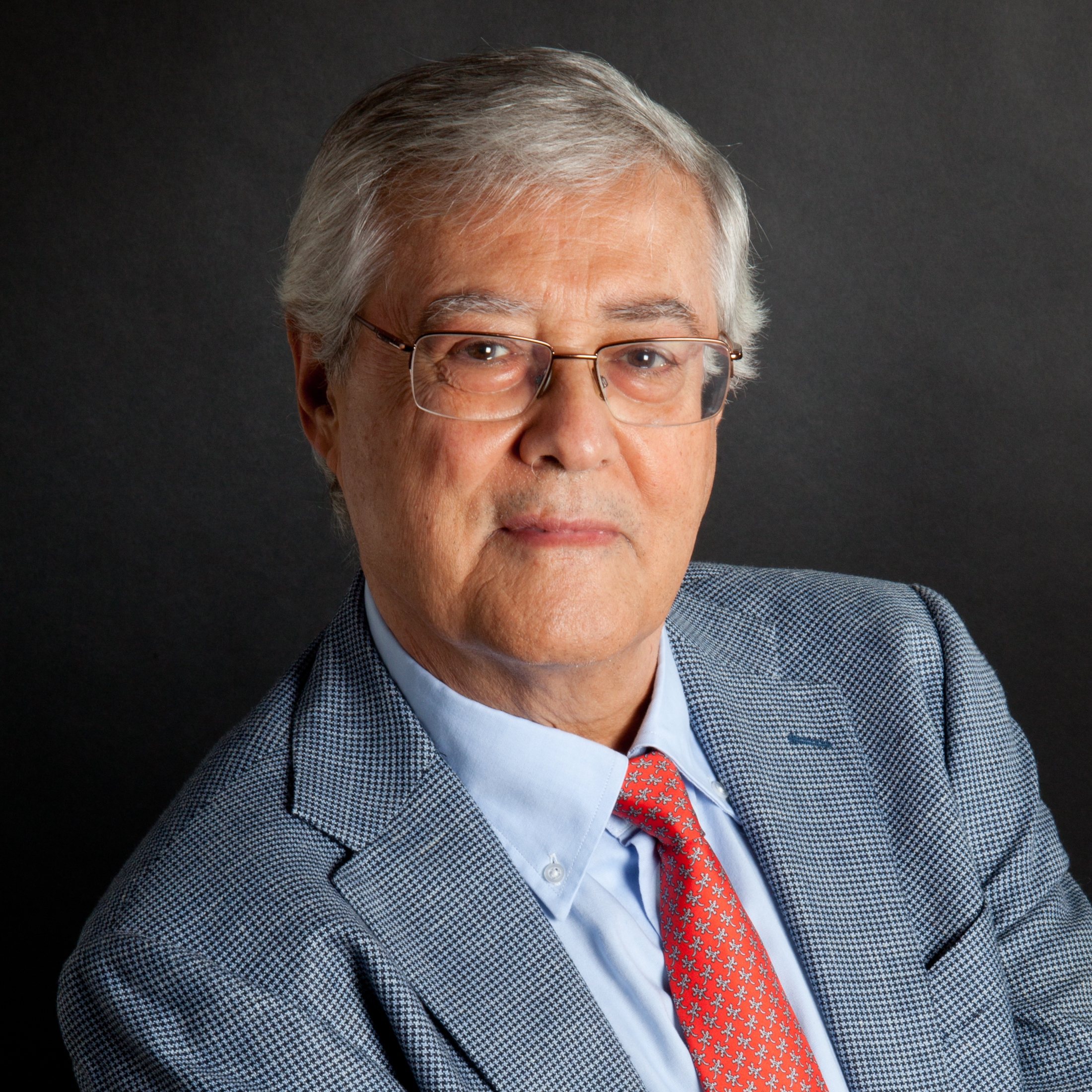 Psiquiatra Julio Vallejo Ruiloba